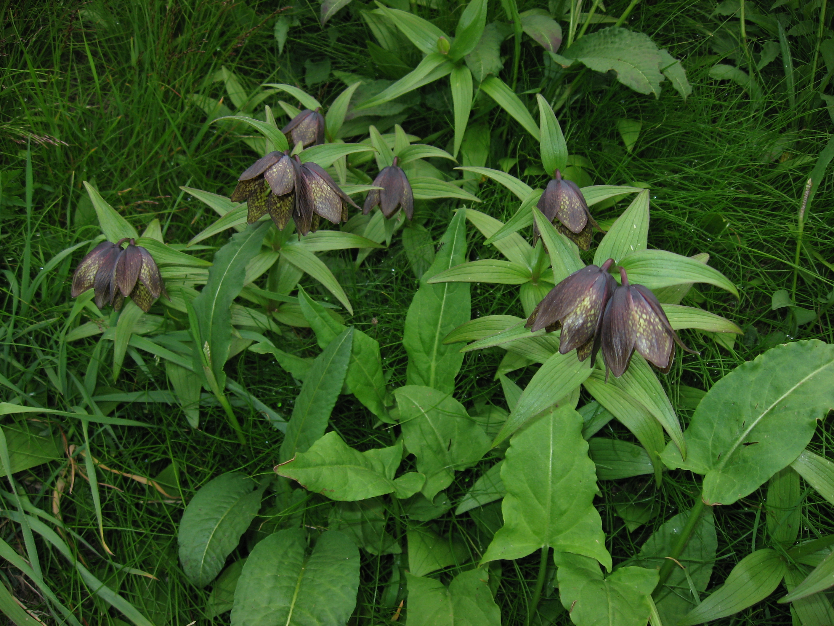 ミヤマクロユリ (Fritillaria camschatcensis ssp. alpina)